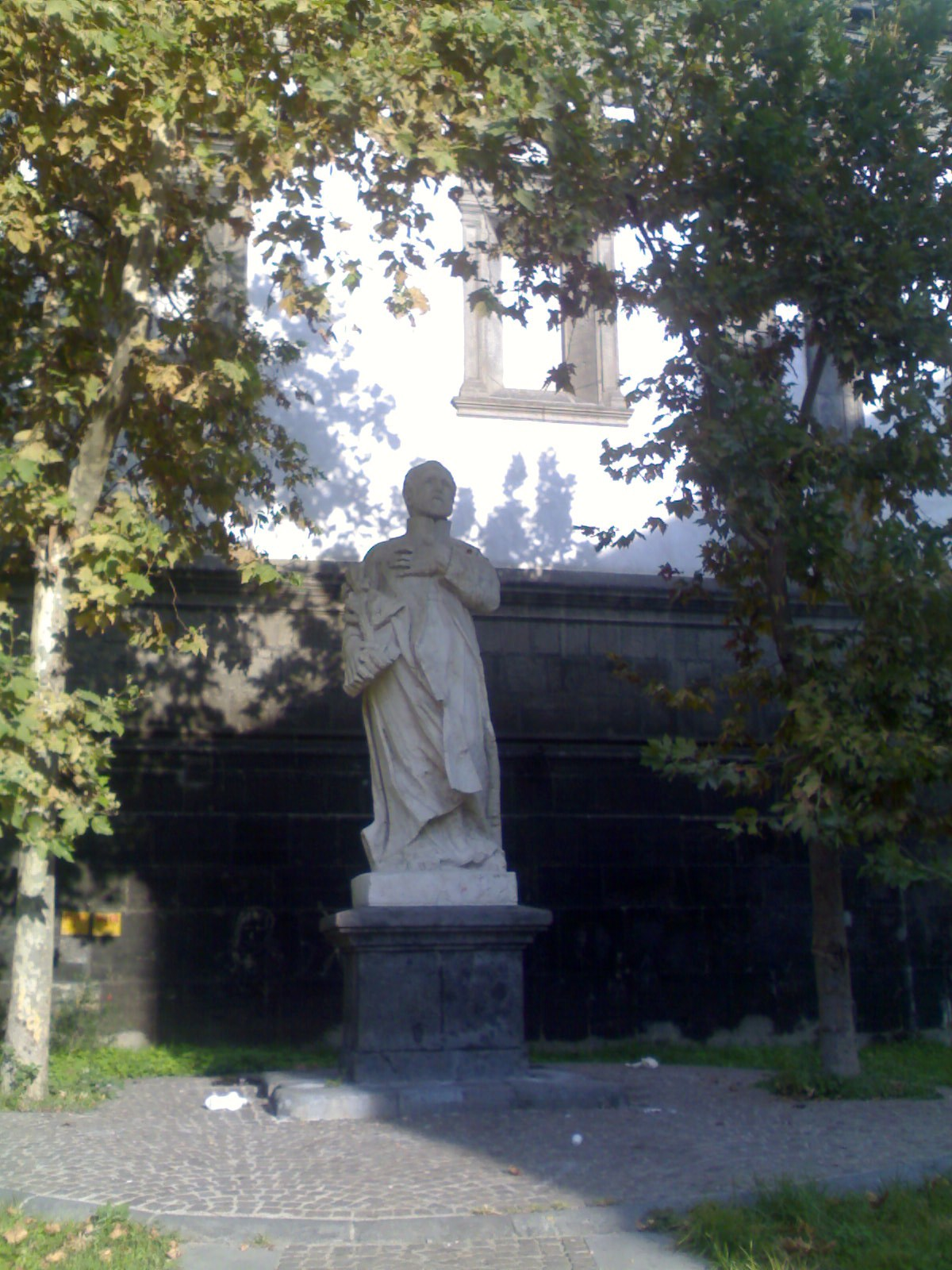 Statua storica nei pressi di Porta Capuana (Napoli)